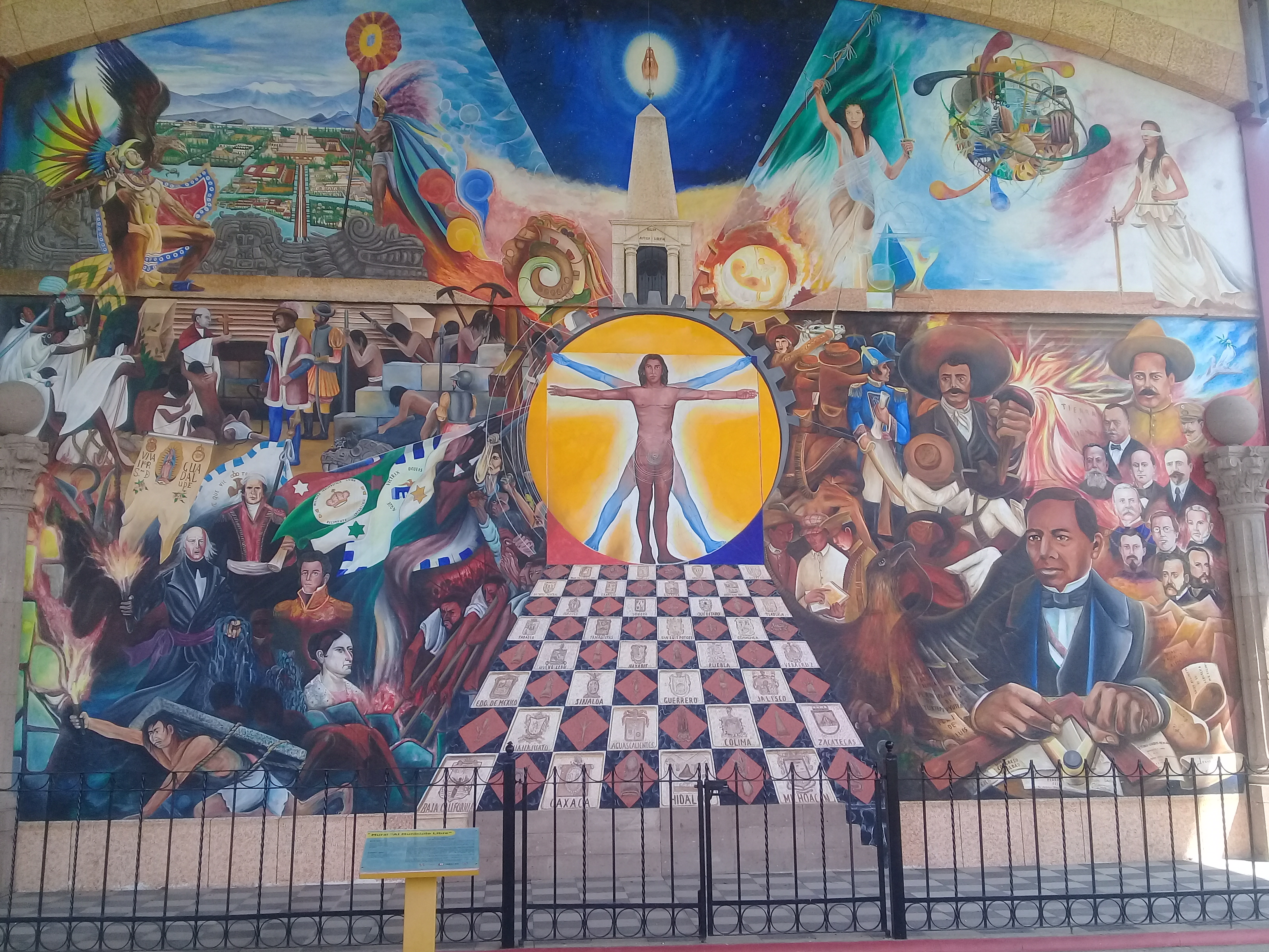 Mural "Municipio Libre" localizado en la entrada al Museo El Rehilete en Pachuca de Soto, Hidalgo, México.